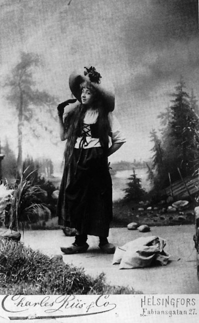 Hilda Castegren i Per Svinaherde